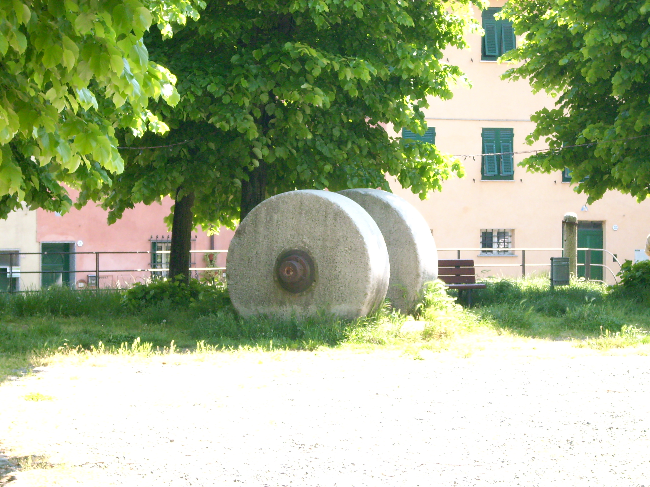 Antiche macine presso Masone, Liguria, Italia